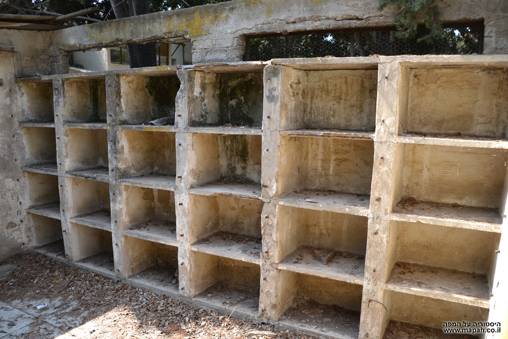 Givat Brenner Pigeon Coop